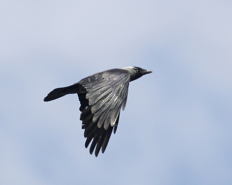 Eurasian Jackdaw (Corvus monedula) Local name: Taccola, Taccola eurasiatica June 6, 2008 Altamura, Italy Distribution: 690V7500